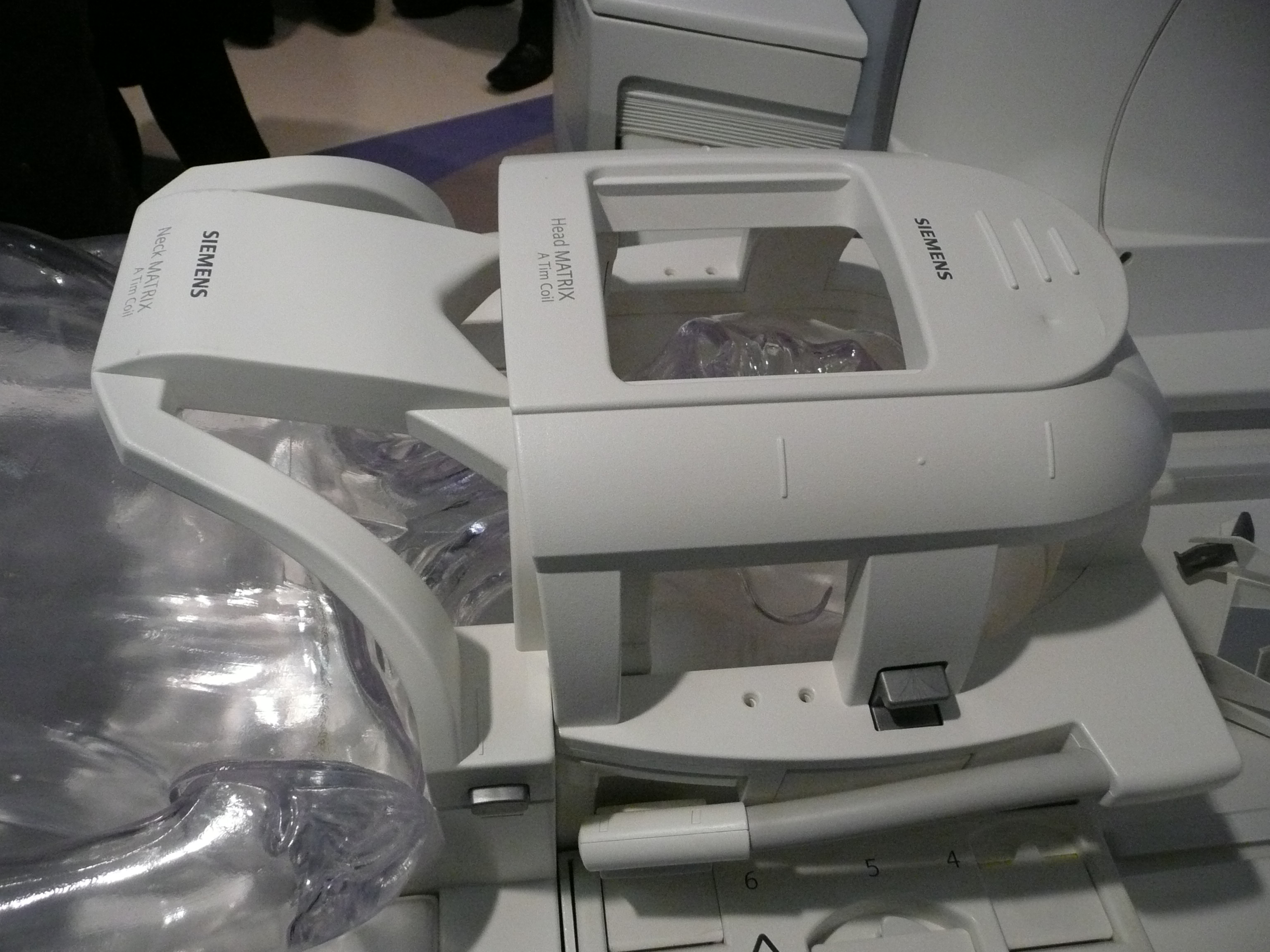 Atenne Volumique de type neuro-vasculaire de marque Siemens destinée à l'imagerie par résonance magnétique